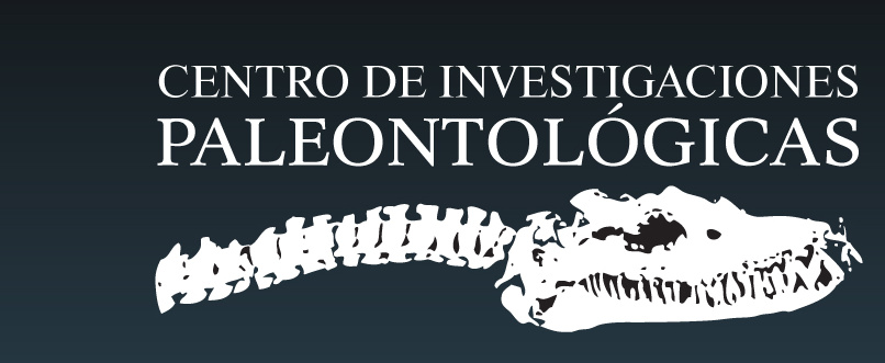 LOGO OFICIAL DEL C.I.P.